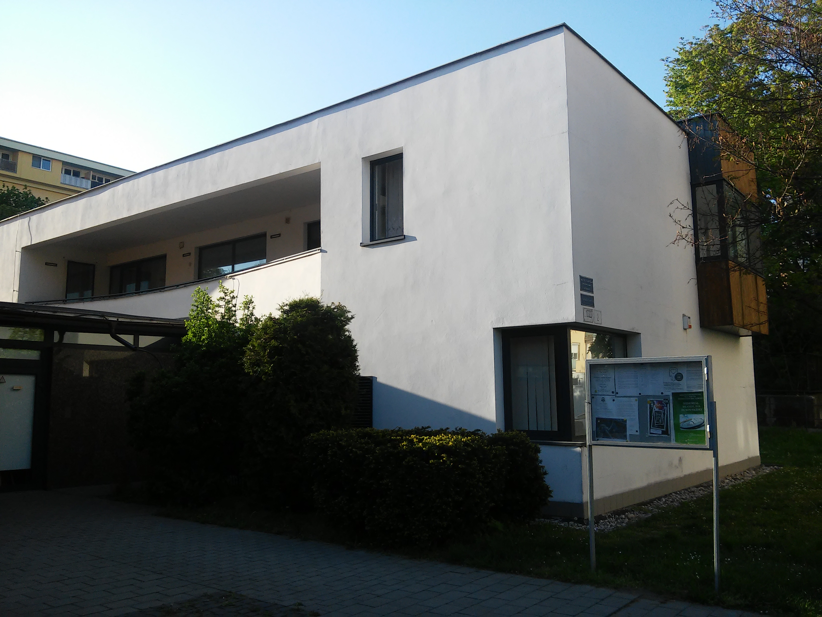 Rímskokatolícke pastoračné centrum Kráľovnej rodiny, Bratislava